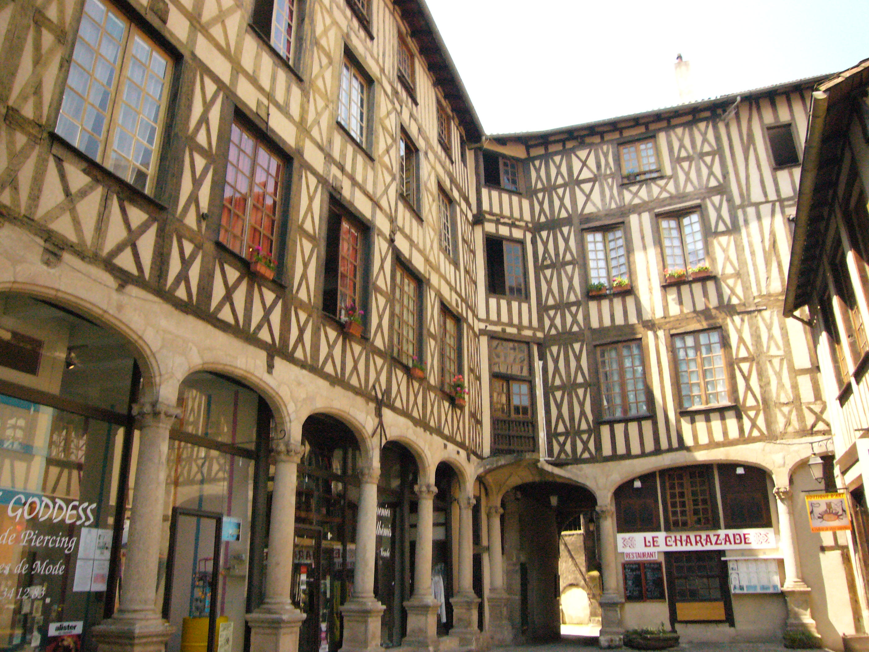 La cour du Temple (Limoges, France)